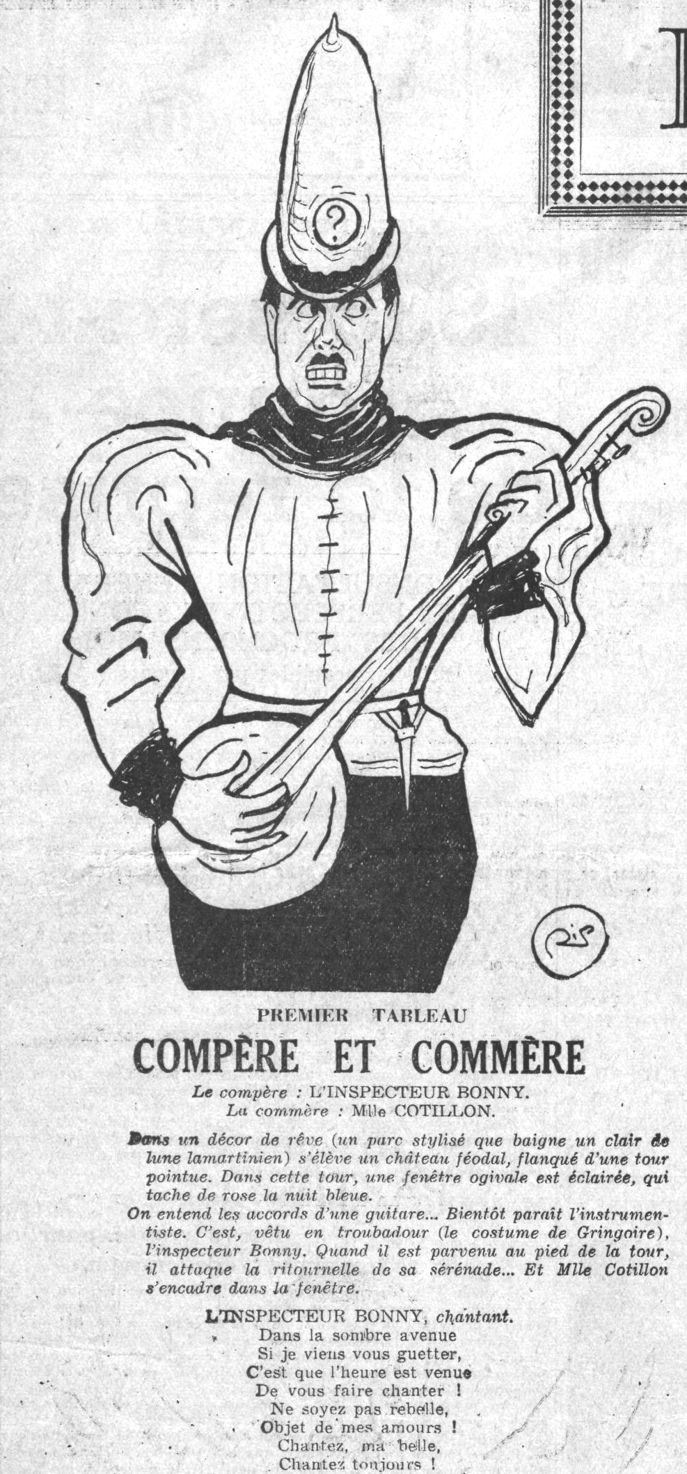 L'inspecteur Bonny, brocardé par le quotidien Paris-Soir pour ses amours supposés avec la demoiselle Cotillon, dans une parodie publiée le 1er janvier 1935.